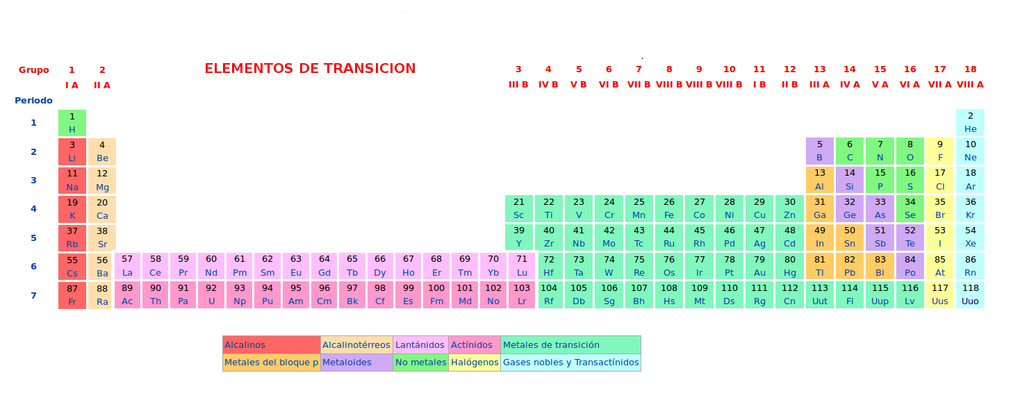 modificacion de la tabla periodica en la que no se modifico el lugar de los elementos de transicion